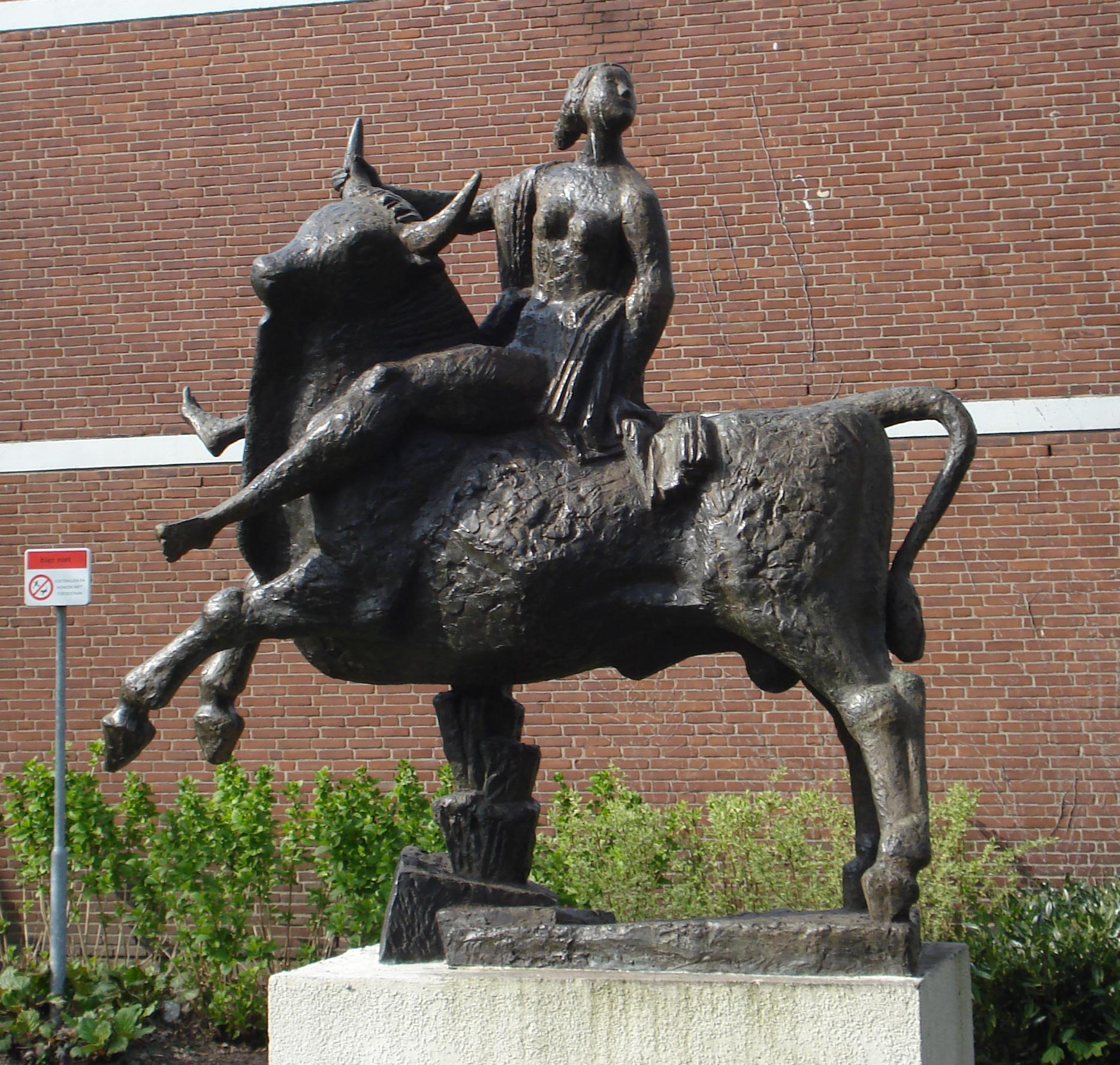 Den Haag, Hofzichtlaan. Kunstwerk "Europa" van Dirk Bus. The Hague/The Netherlands.